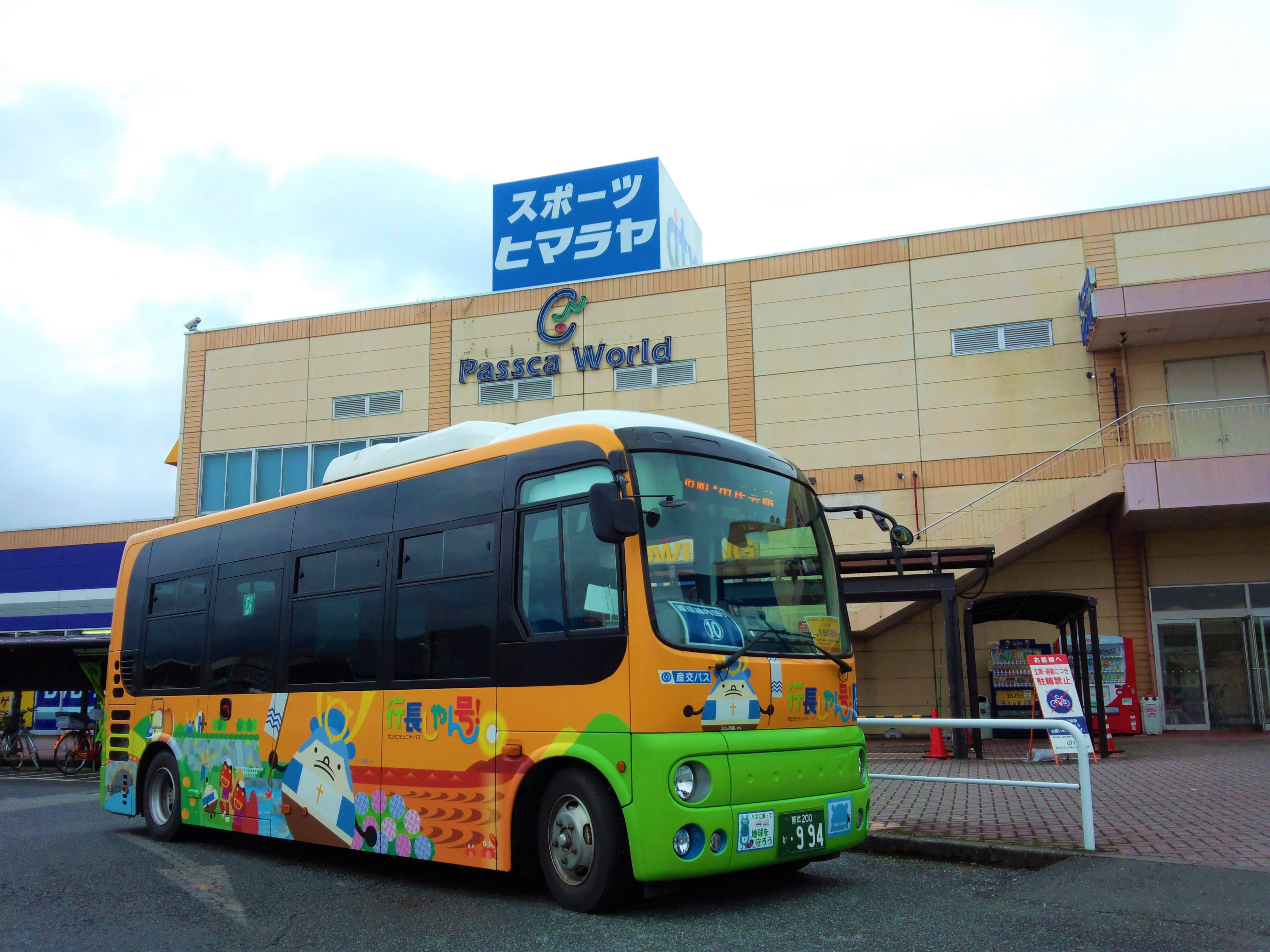 産交バス「行長しゃん号」専用車の日野・ポンチョ（No.994）